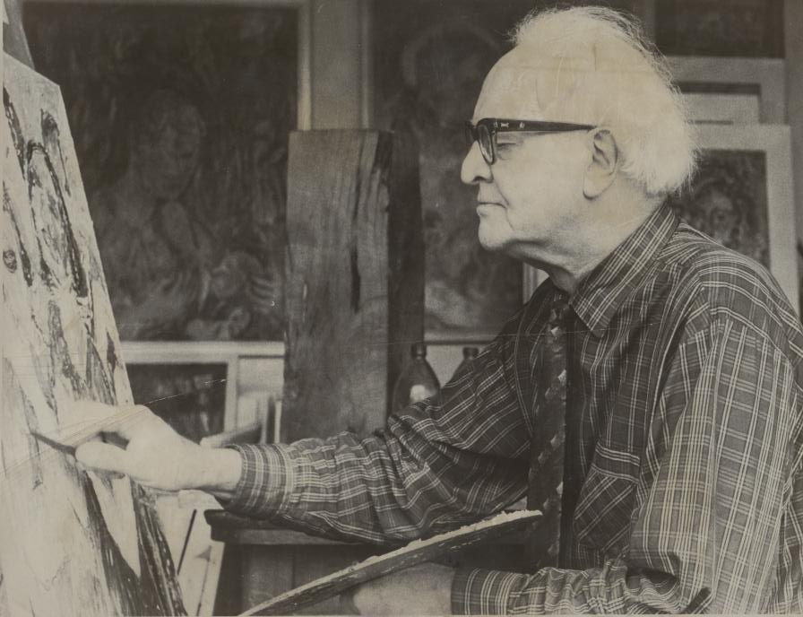 Wilhelm Webels an seiner Staffelei